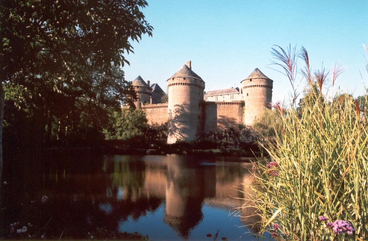 Chateau de Lassay (photo perso - libre)